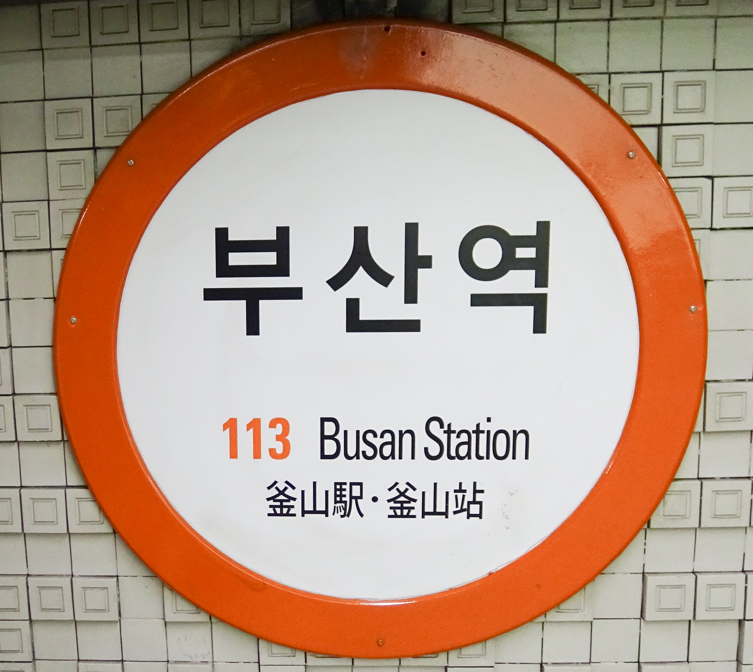 「釜山駅駅」駅名標